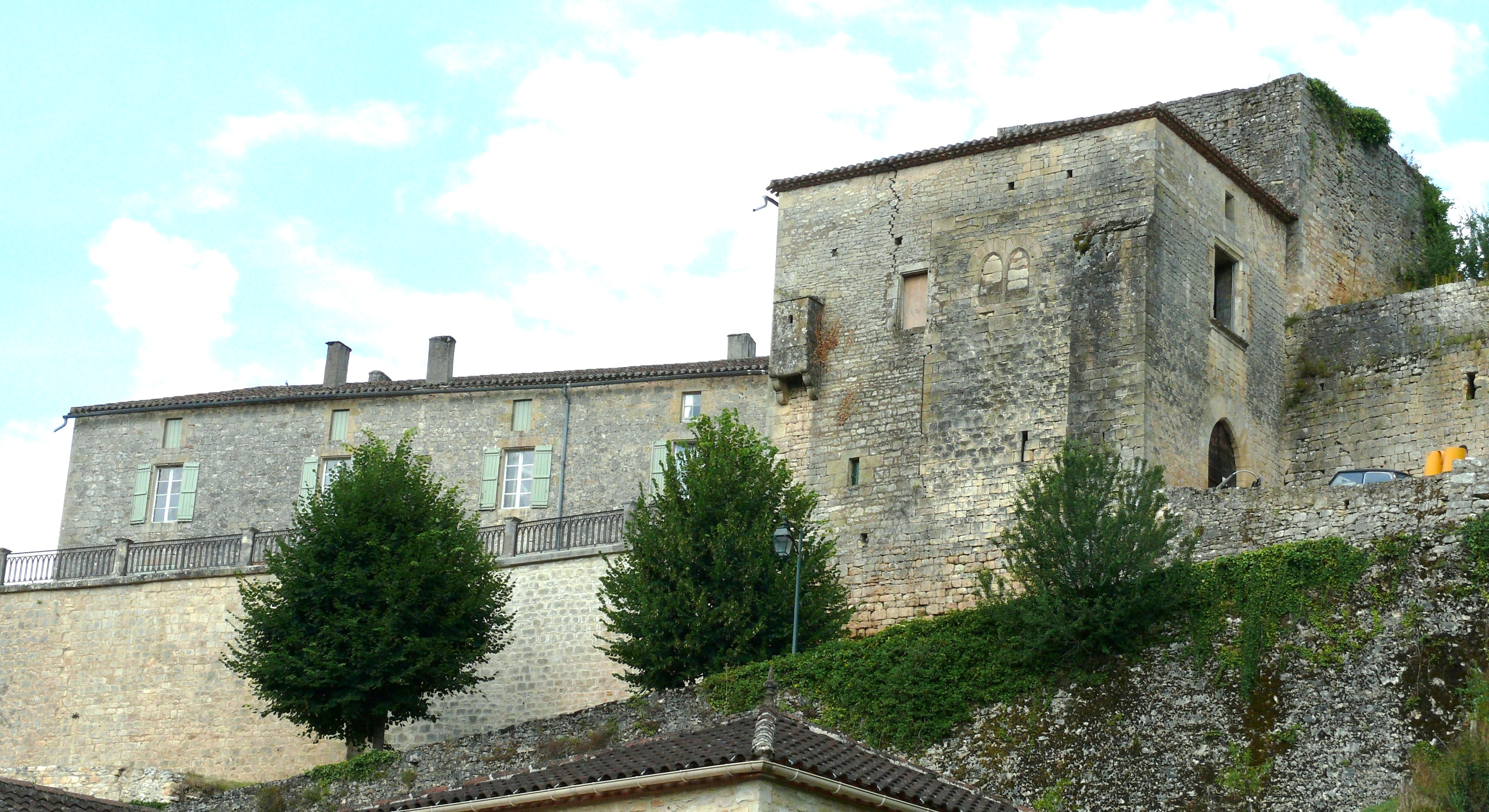 Blanquefort-sur-Briolance - Château